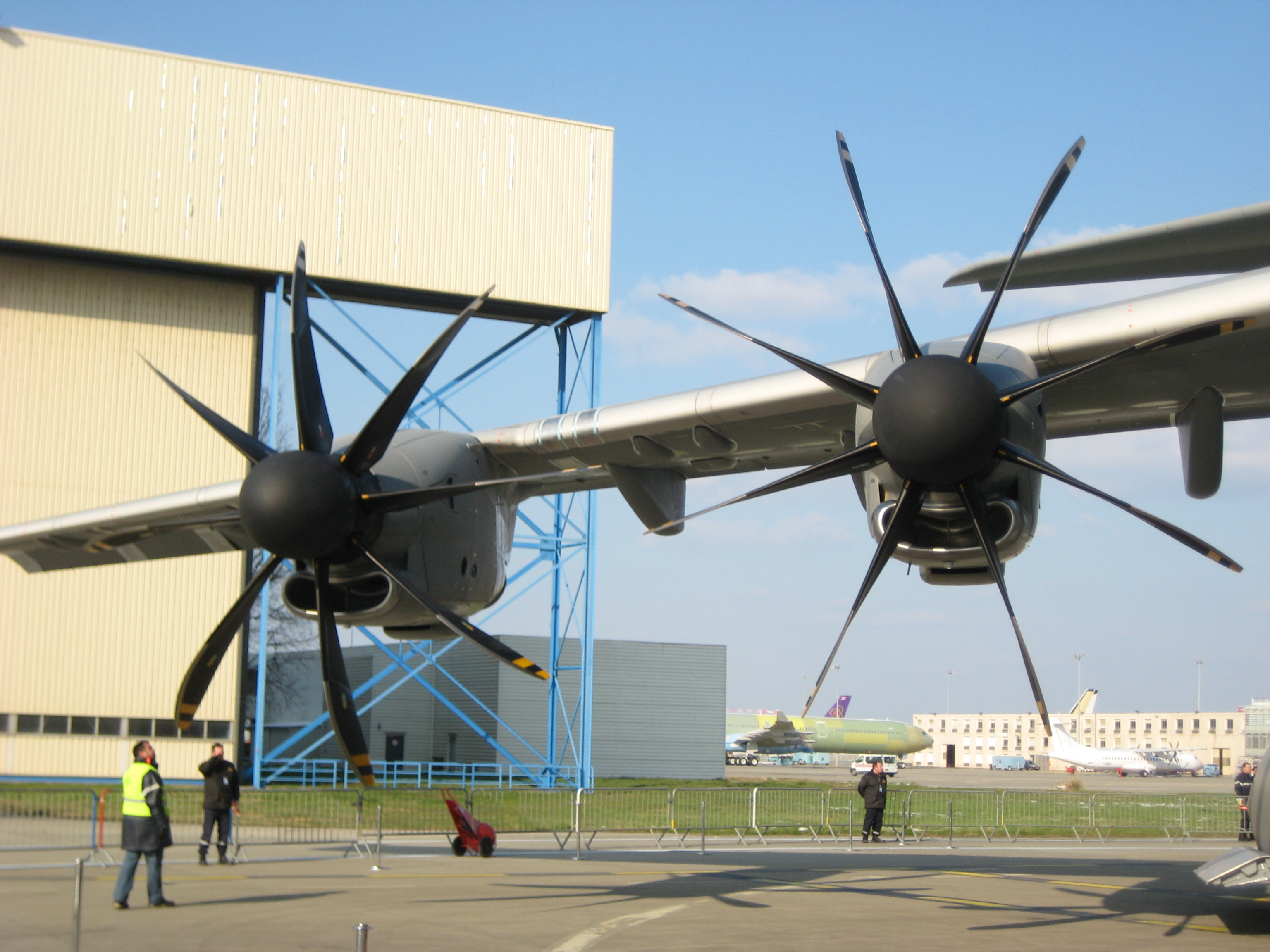 Premier atterrissage de l'A400M à l'éroport de Toulouse-Blagnac, le 9 mars 2010